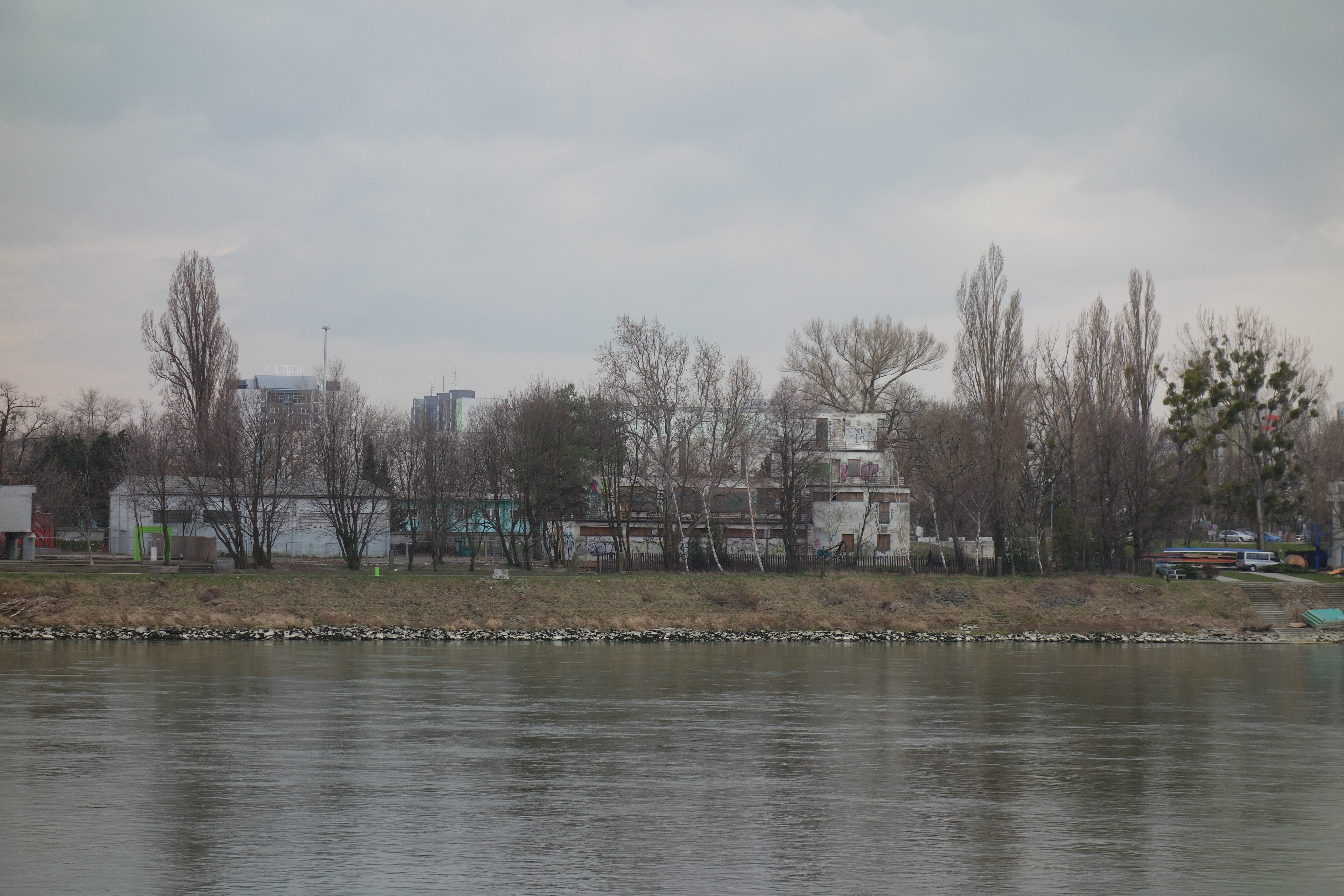 Nemecký veslársky klub, Bratislava